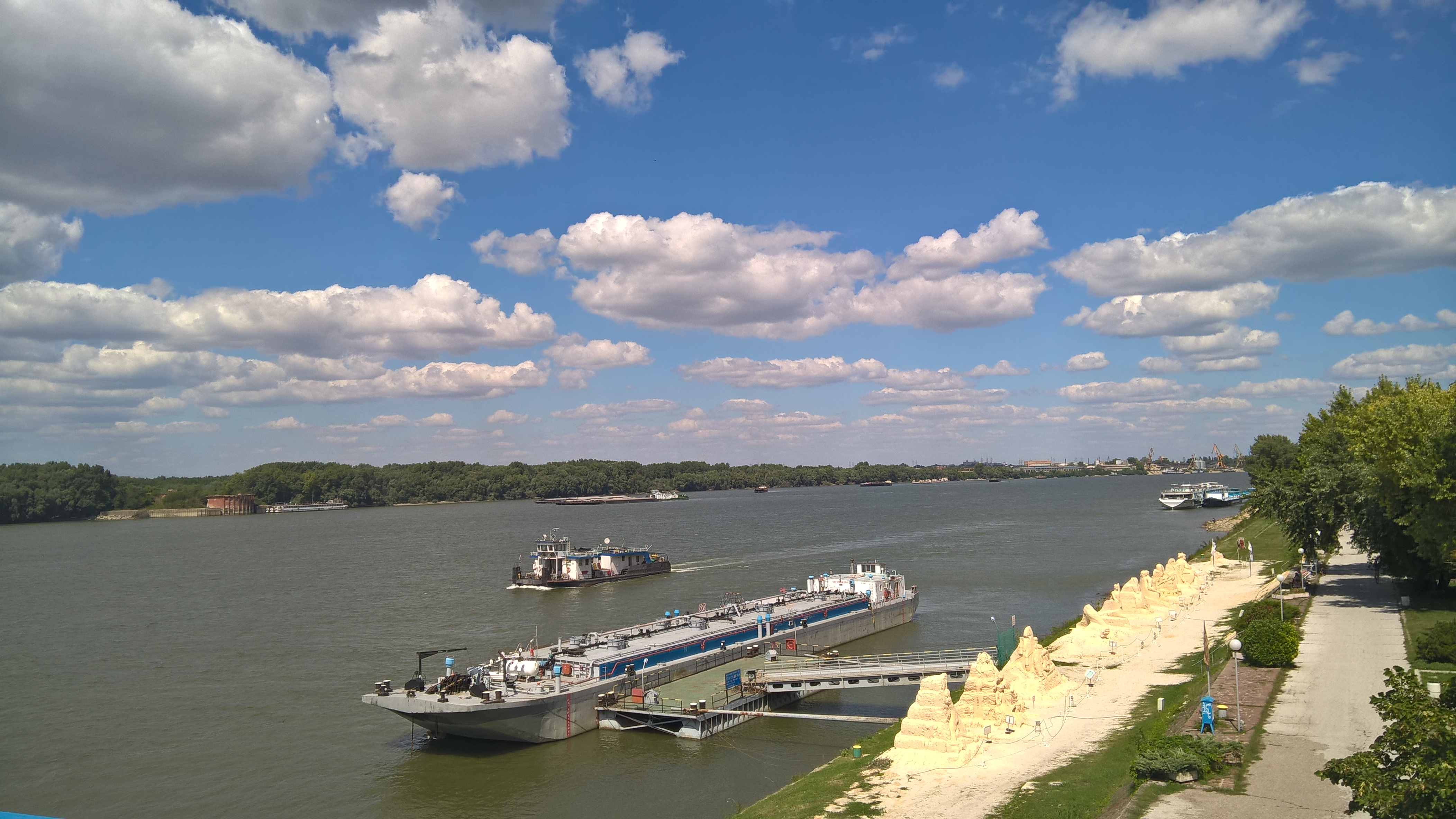 Пристанът